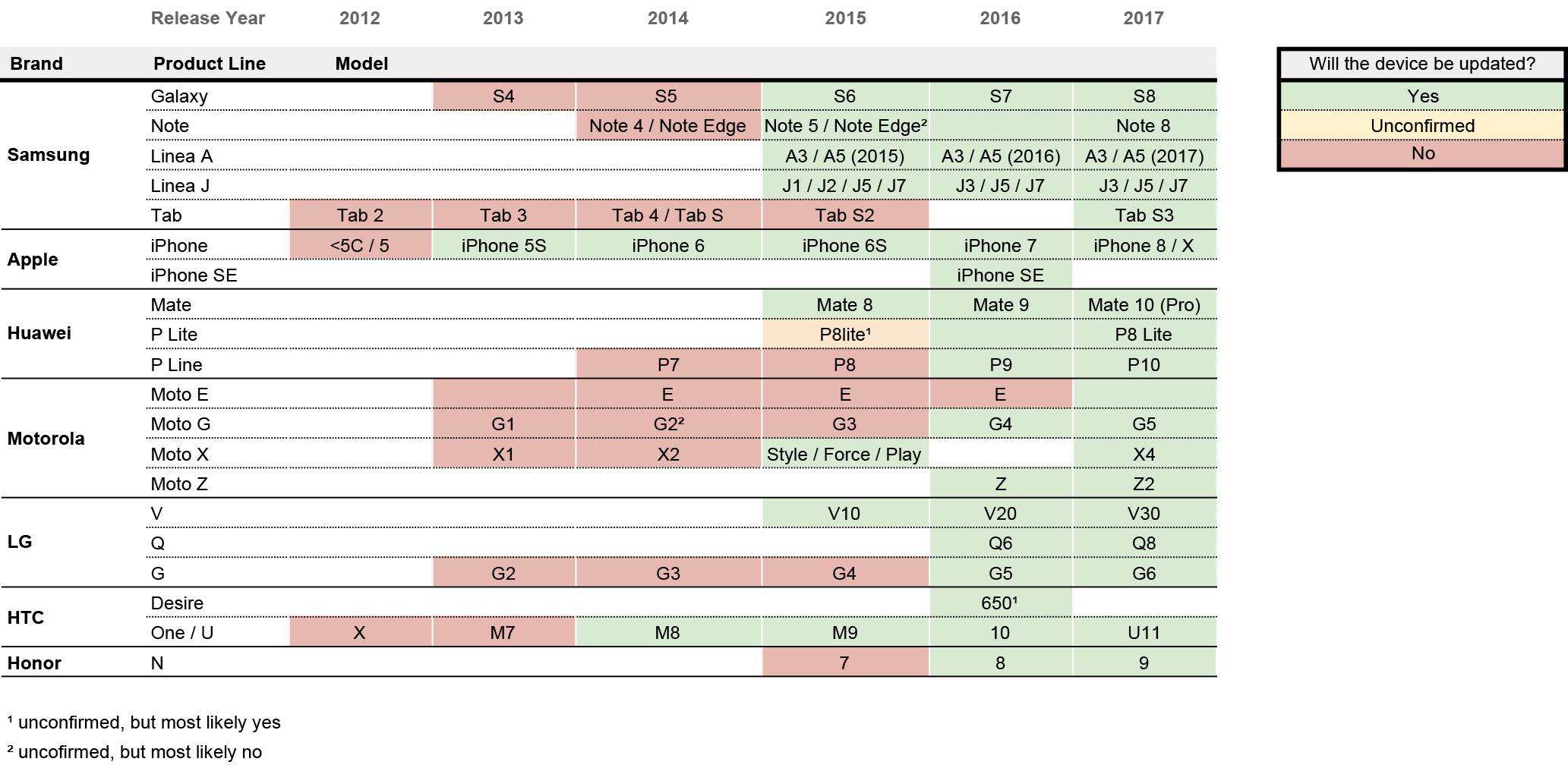 Questo grafico dimostra la disponibilità di aggiornamenti Android & iOS contro le falle di sicurezza Meltdown & Spectre per i Smartphone piu venduti in Italia.